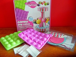 Силиконовые формы для кейк попсов